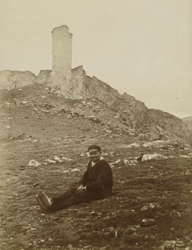 Tour de la Massane vers 1884-89